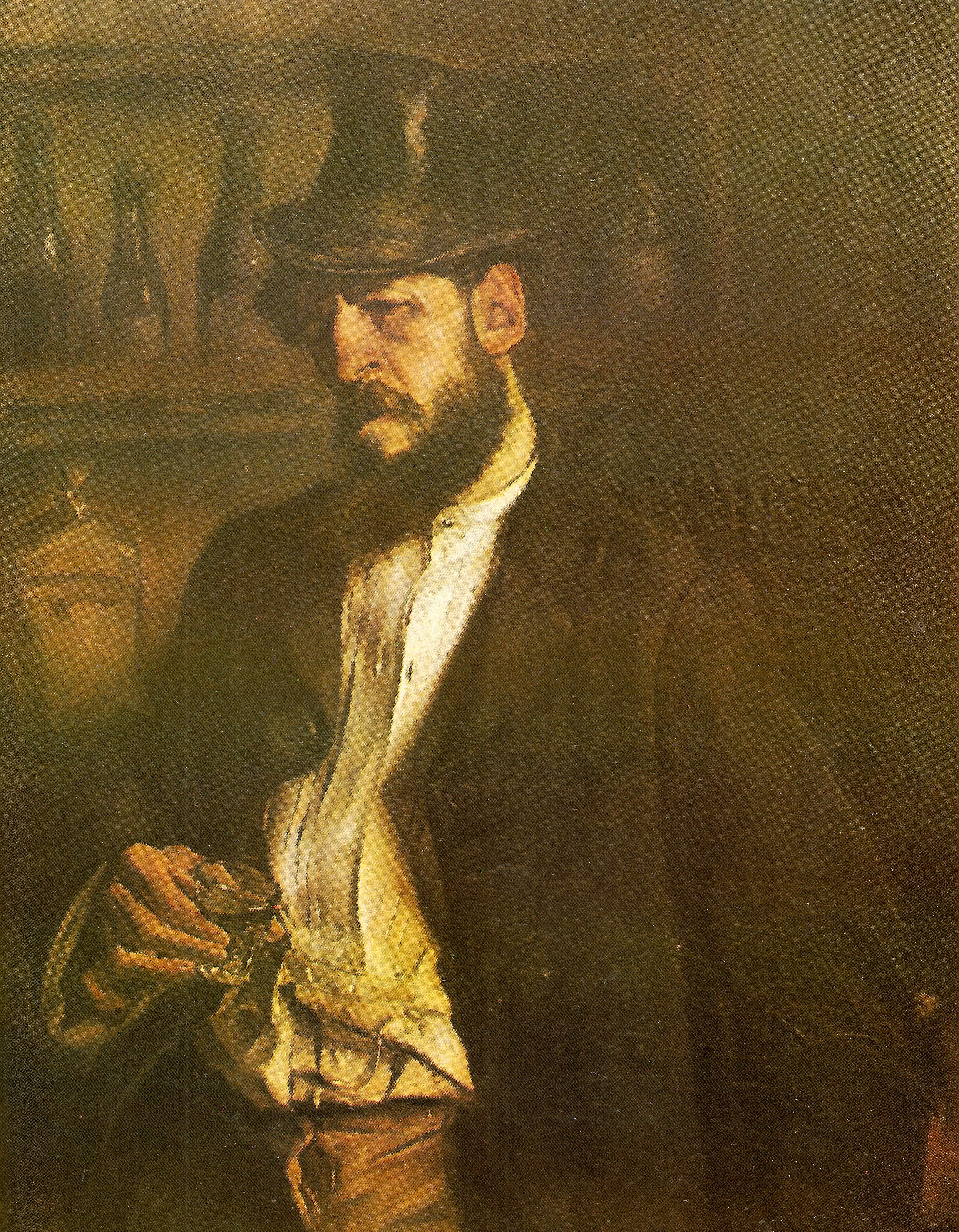 El Borracho.